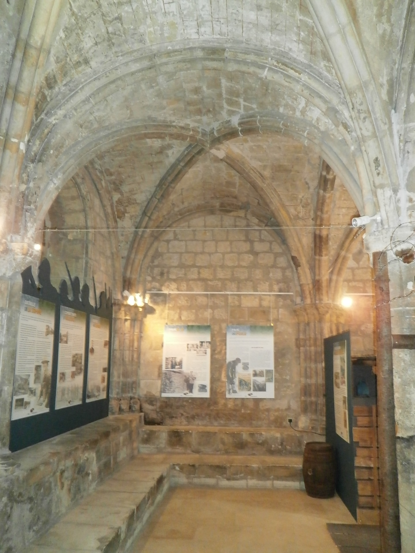 Abbaye Saint-Julien de Tours - voûtes de la salle capitulaire